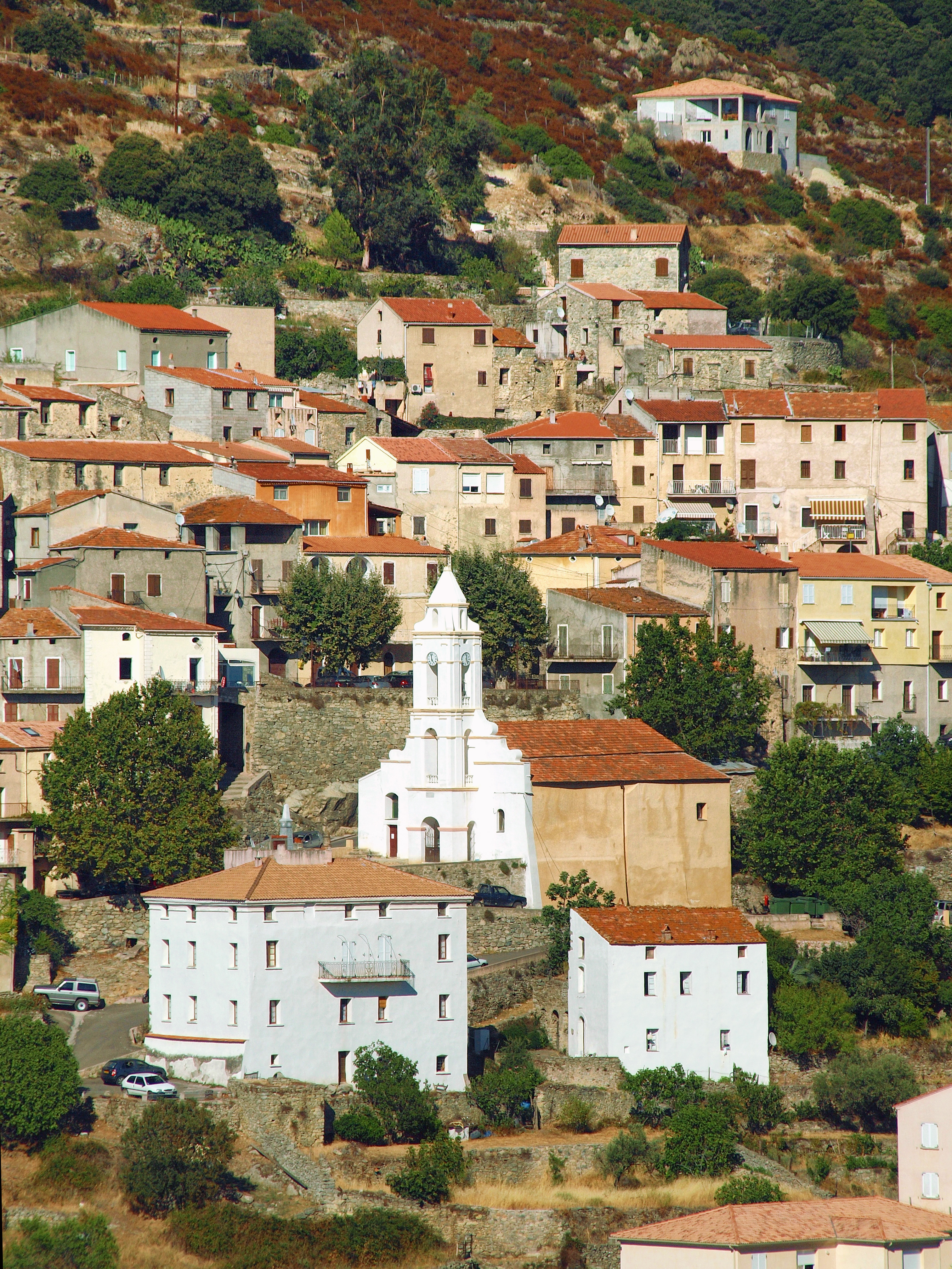 Pietralba, Balagne (Corse) - L'église Saint-Roch au cœur du village de Teto